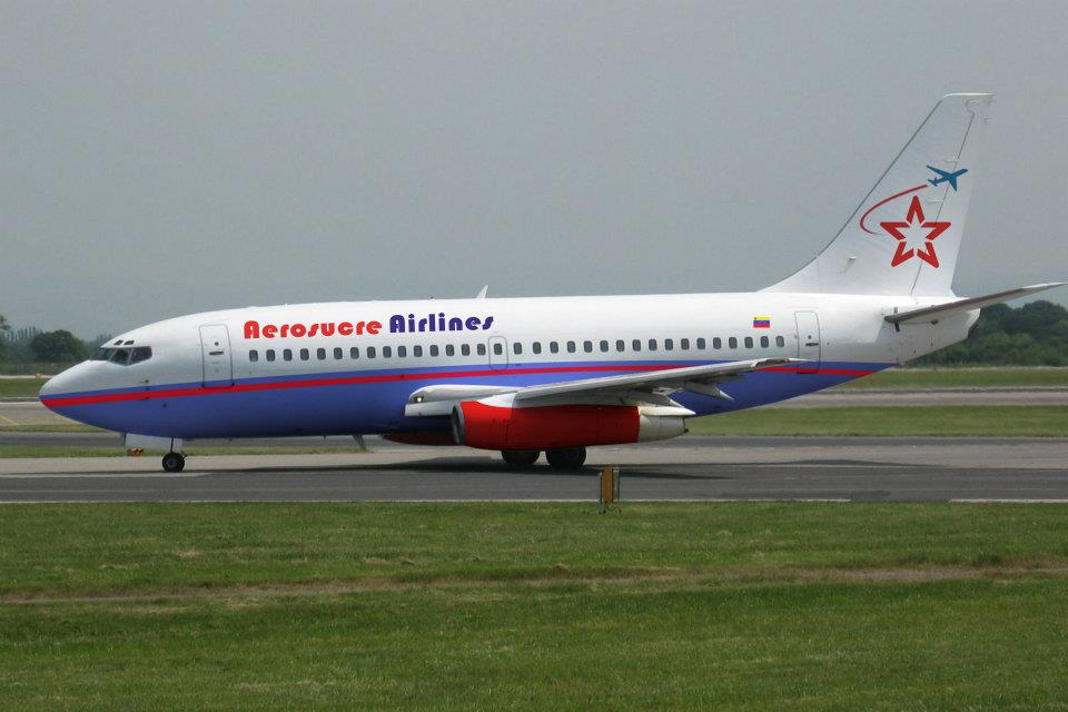 Boeing 737 200 delivey de la compañia aérea aerosucre airlines